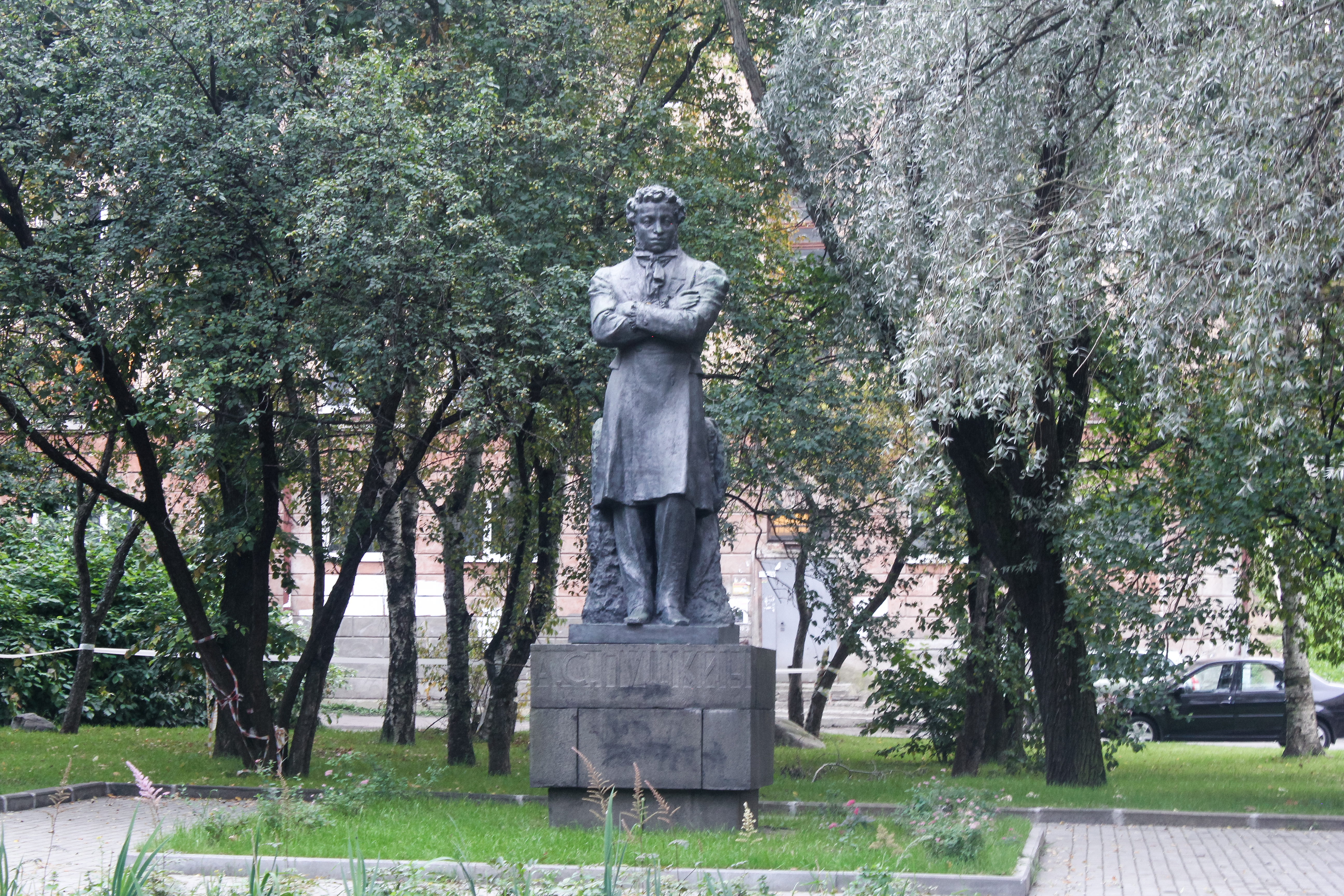 Памятник А.С. Пушкину: улица Пушкинская, Петрозаводск, Карелия